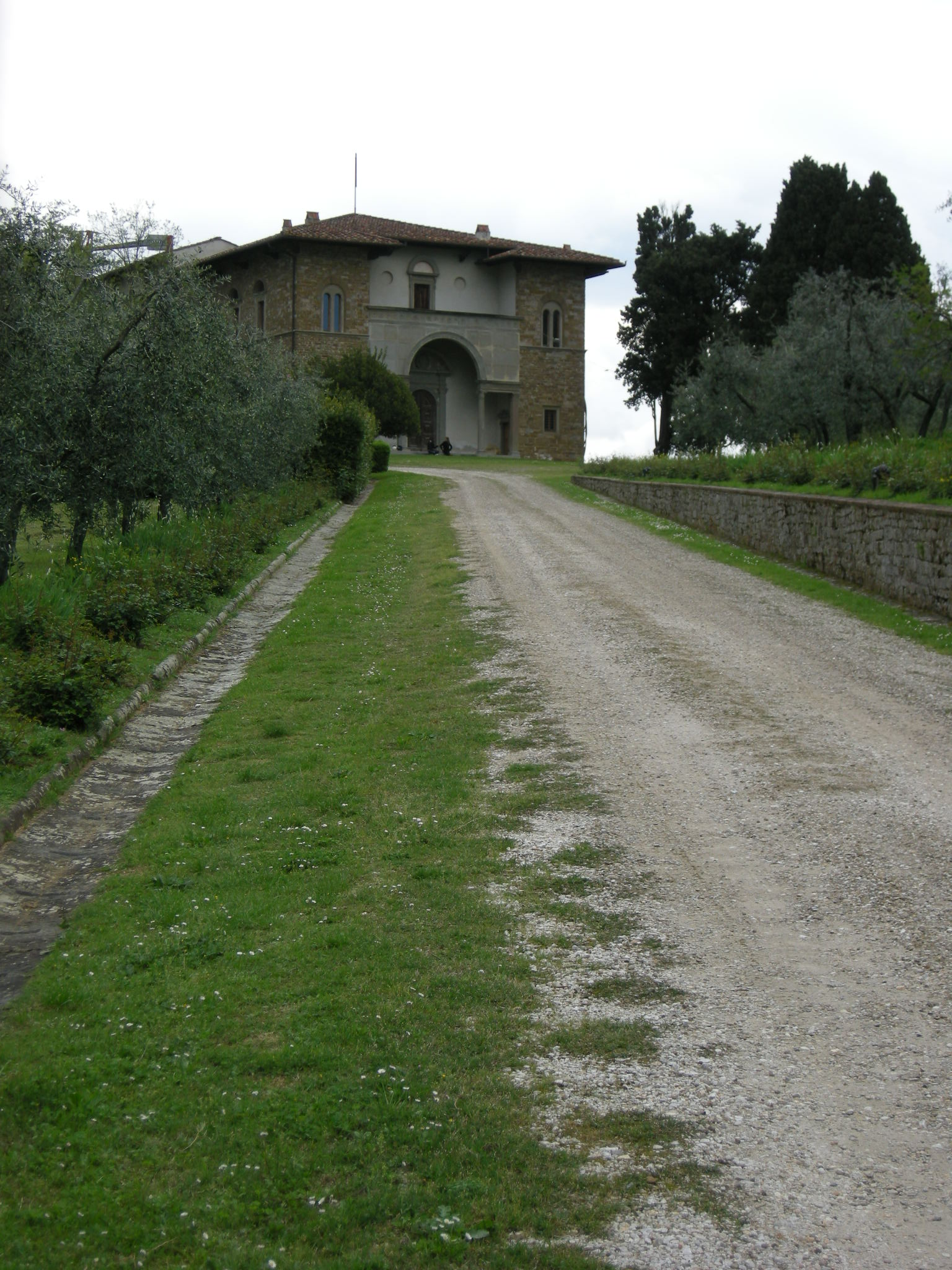 Villa La Gallina